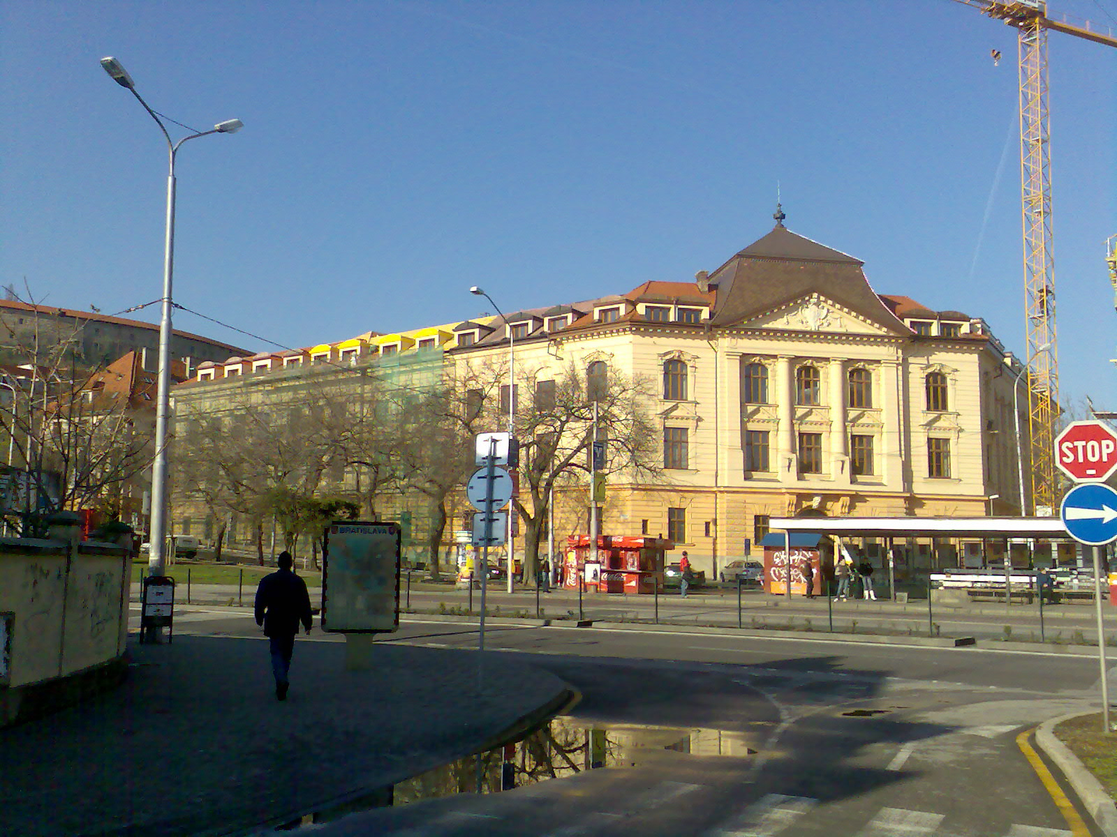 Vysoká škola múzických umení na začiatku Zochovej ulice. Budova hudobnej a tanečnej fakulty na Zochovej ulici.